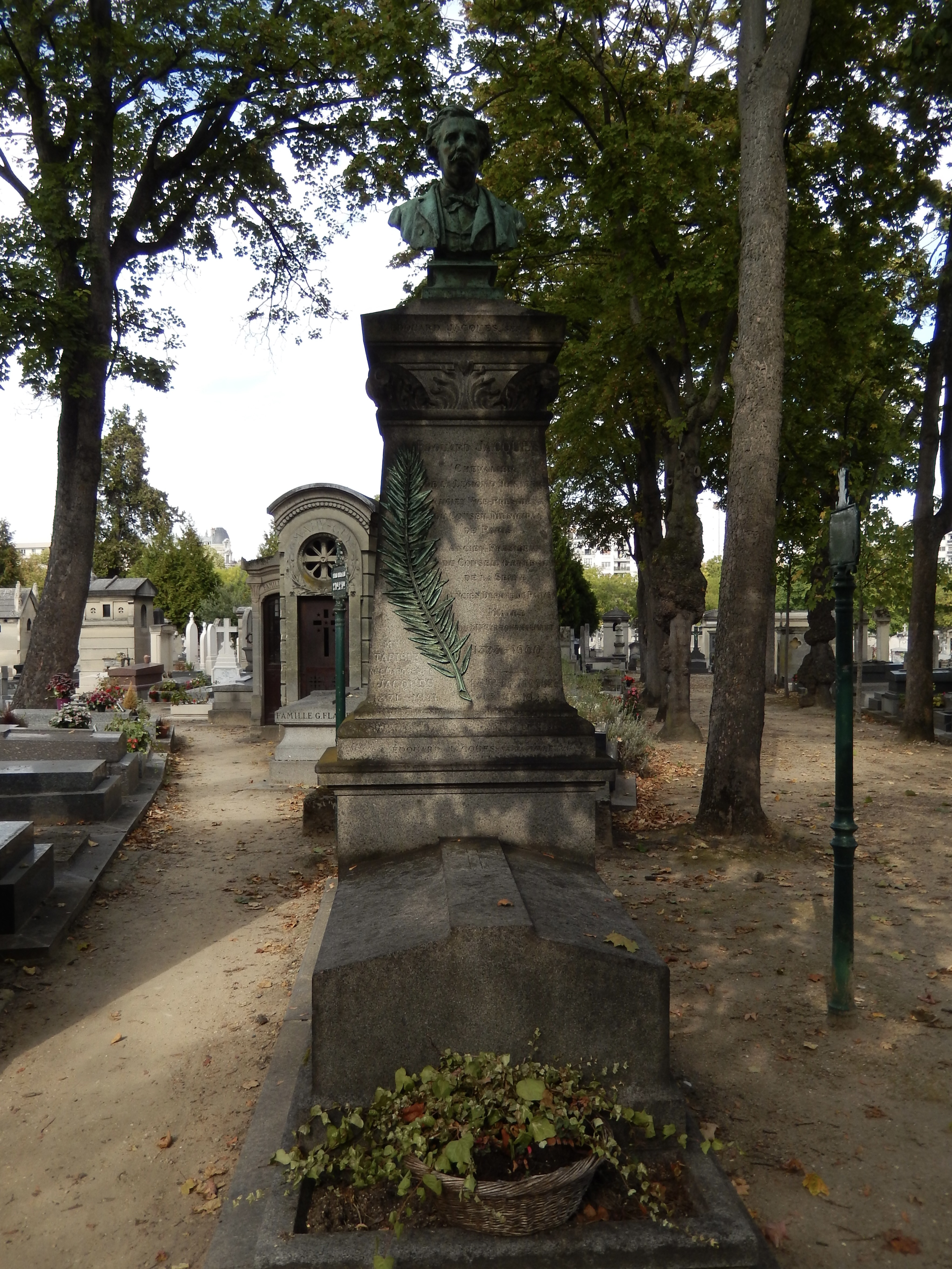 Tombe de Edouard Jacques (cimetière du Montparnasse)